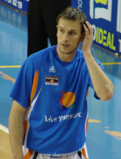 Marino Baždarić - Menorca Basquet 06/07